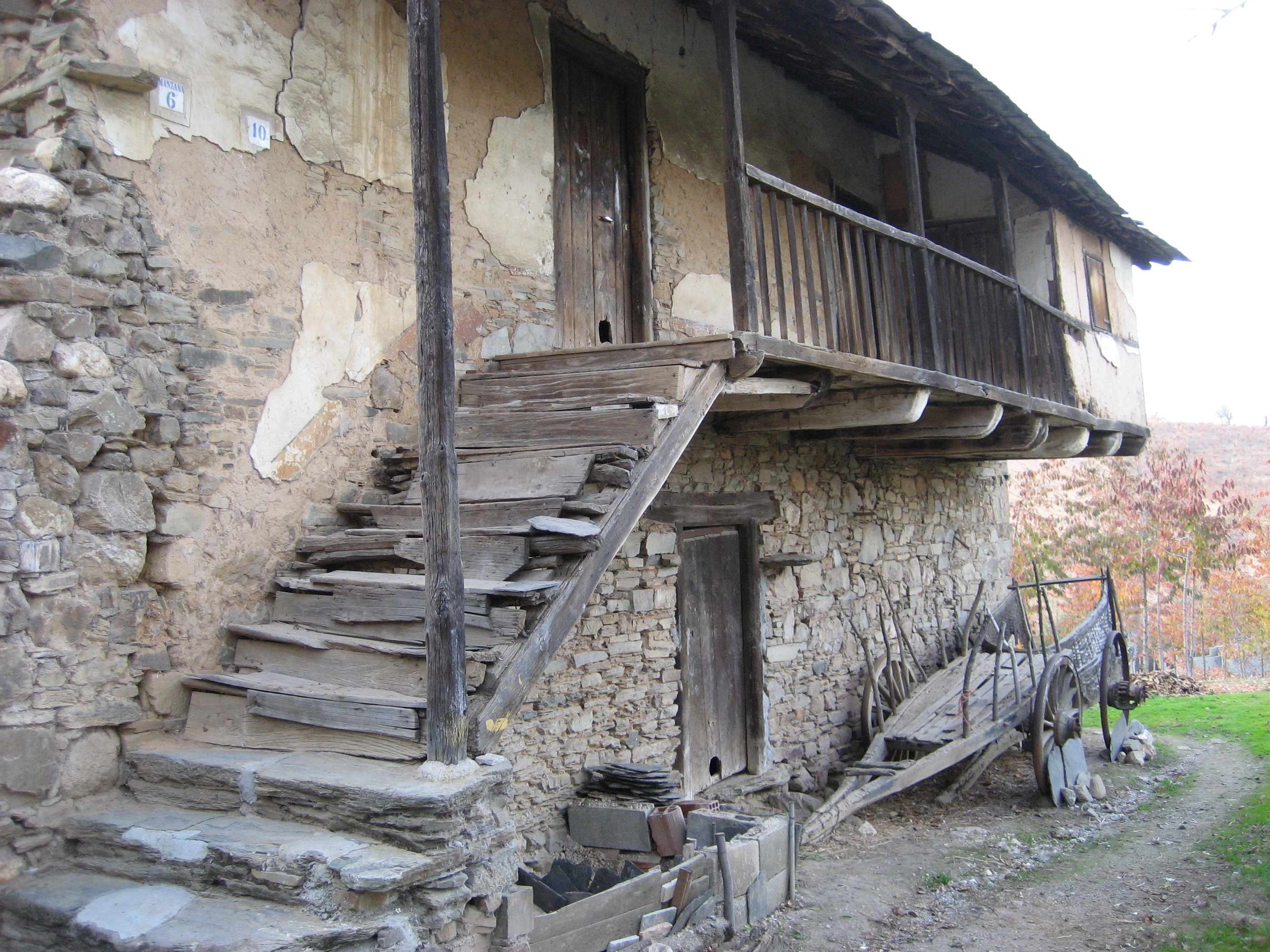 Arquitectura tradicional berciana en San Lorenzo del Bierzo (León, España).